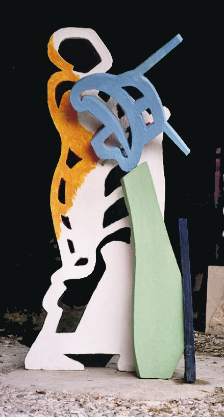 Ludwig Stocker, Styropor- Zement, bemalt, 1990